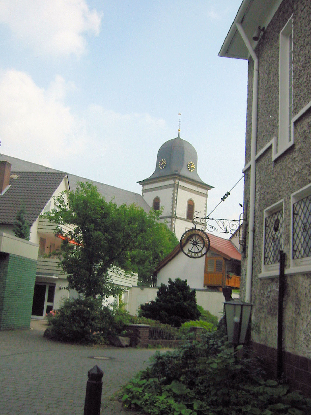 Verl, St.-Anna-Kirche